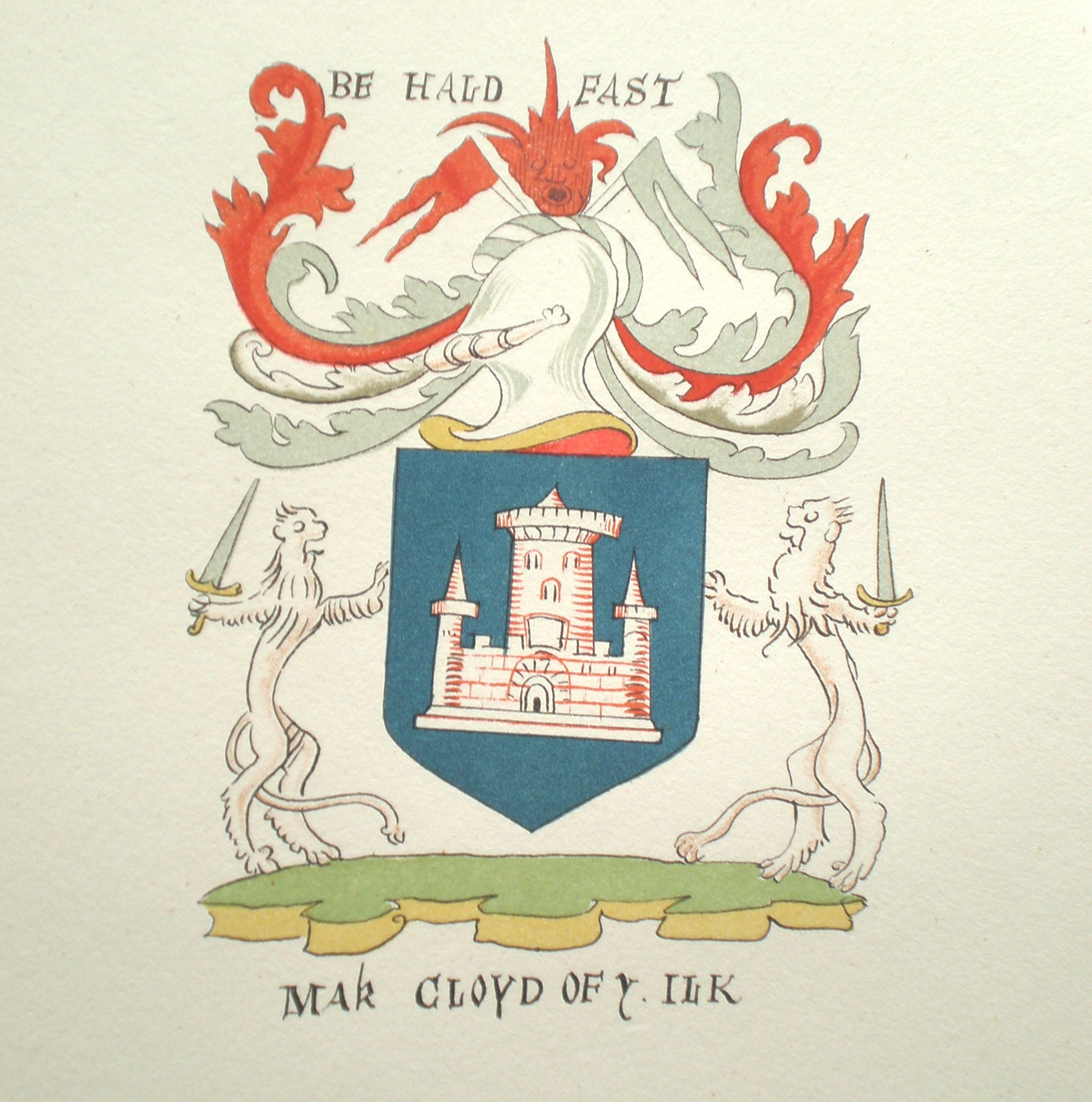 Familiewapen MacLeod